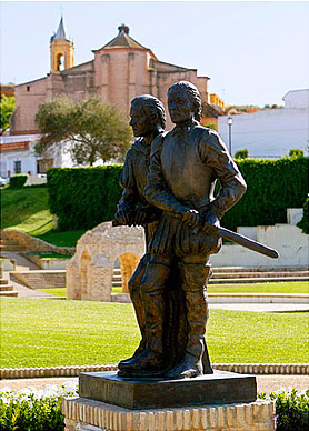 Estatua de los Hermanos Pinzón, entorno de la Fontanilla, Palos de la Frontera (Huelva).